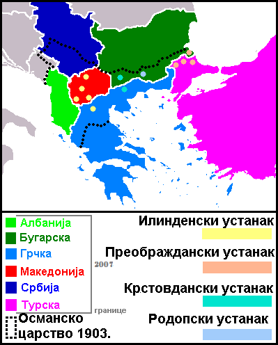 Мапа са приказом локација Илиндаског, Преображданског, Крстовданског и Родопског устанка